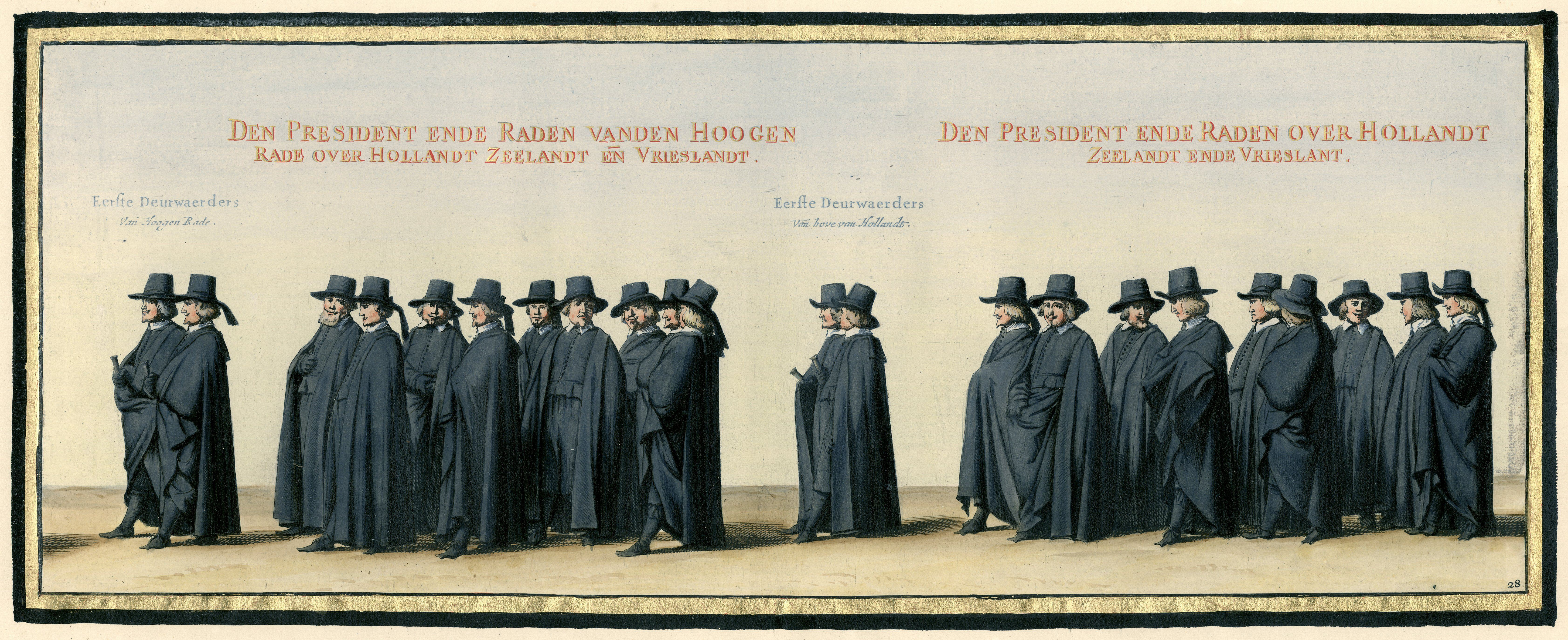 De begrafenisstoet van Frederik Hendrik, plaat nr. 28. Begraeffenisse van syne hoogheyt Frederick Henrick. Luxe ingekleurde uitgave van de prenten van de begrafenisstoet van Frederik Hendrik in 1647 (serietitel). ObjectnummerNG-793-80. Catalogusreferentie FMH 1924. Omschrijving: Ingekleurde prent in een omlijsting versierd met goud en ingeplakt in de luxe editie uit ca. 1755 van het boek 'Begraeffenisse van syne hoogheyt Frederick Henrick' van Pieter Post, uitgegeven te Amsterdam in 1651. De Hoge Raad van Holland, Zeeland en West-Friesland